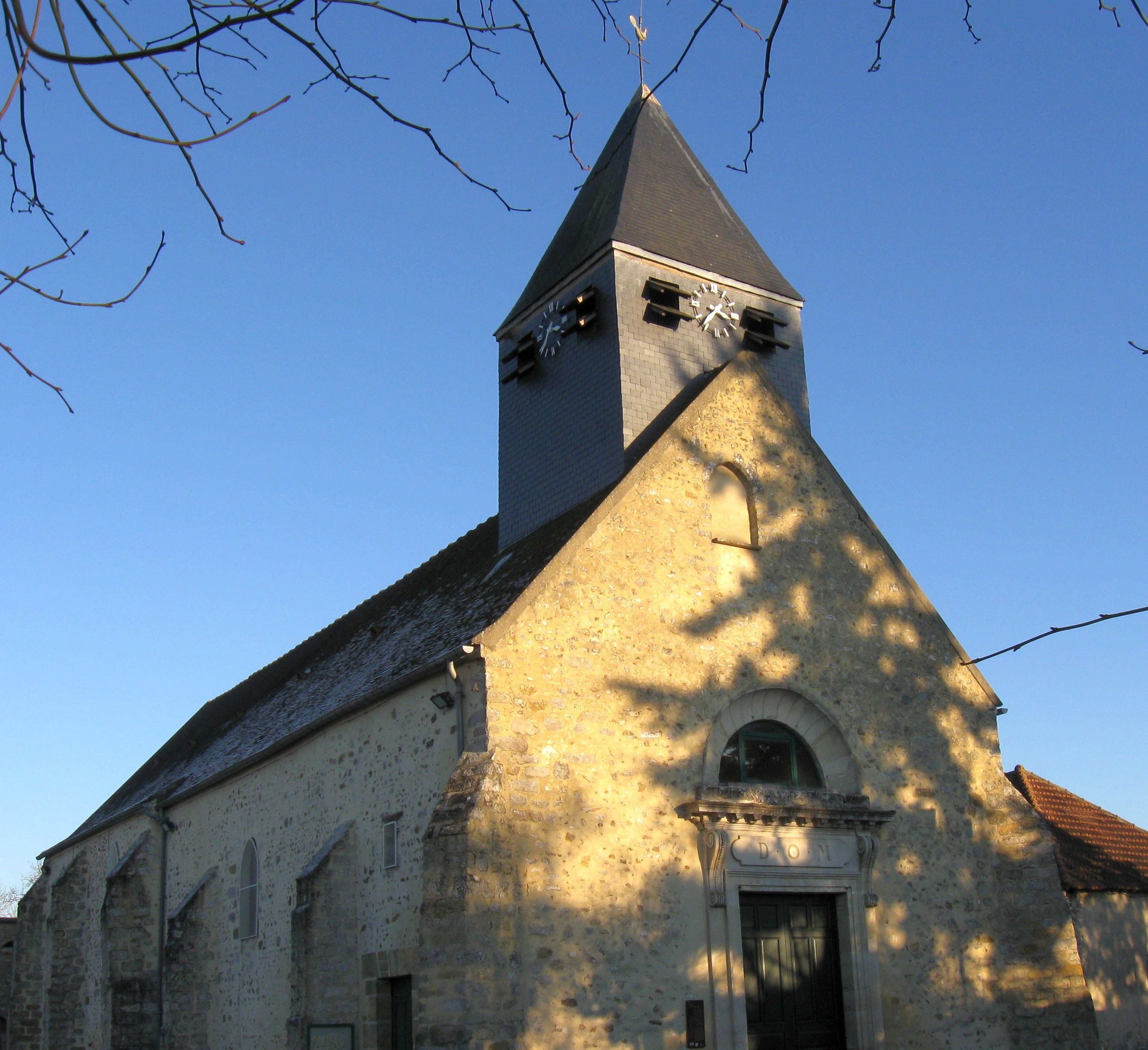 Église Saint-Baudel de Forges (département de la Seine-et-Marne, région Île-de-France).